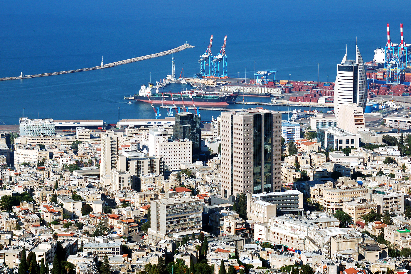 see title